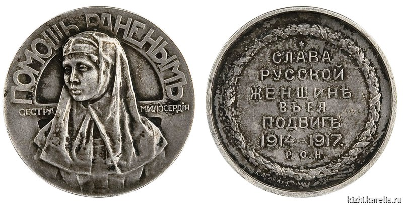 Медаль 1914 - 1917 Сестра милосердия Помощь раненным.Гравер Малышев. Мастерская Жакара. Петроград, 17,94 гр. Диаметр 33 мм